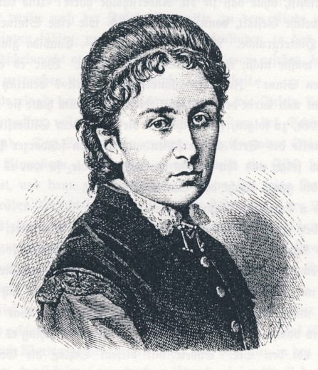 Portrait der deutschen Schriftstellerin Klara Bauer (Pseud. Karl Detlef).